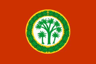 Bandera de la Rep. de Batum 1919 Imagen realizada por J. Ollé Véase también: Wikipedia:Autorizaciones/Banderas de Jaume Ollé, Categoría:Banderas (imagen)